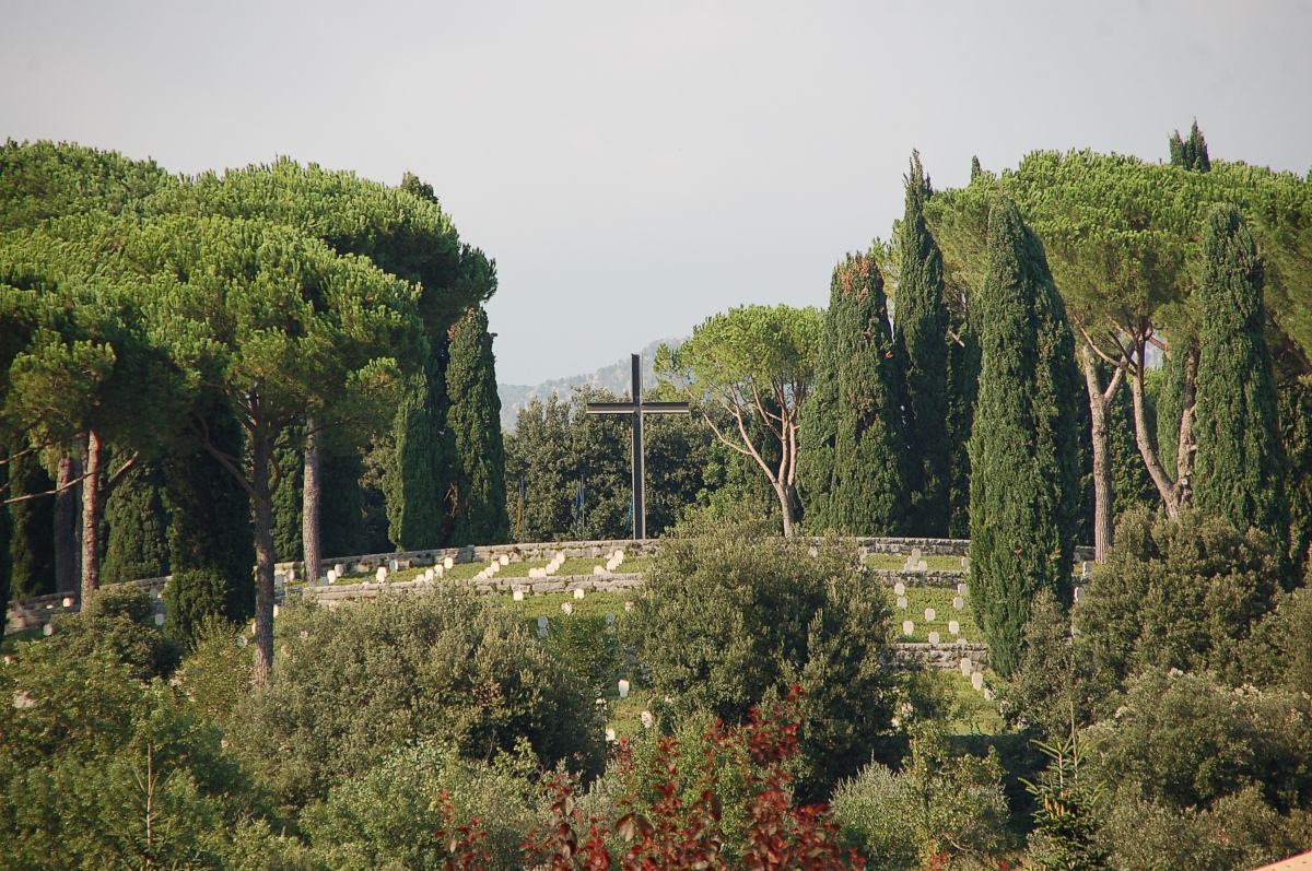 Der deutsche Soldatenfriedhof Cassino